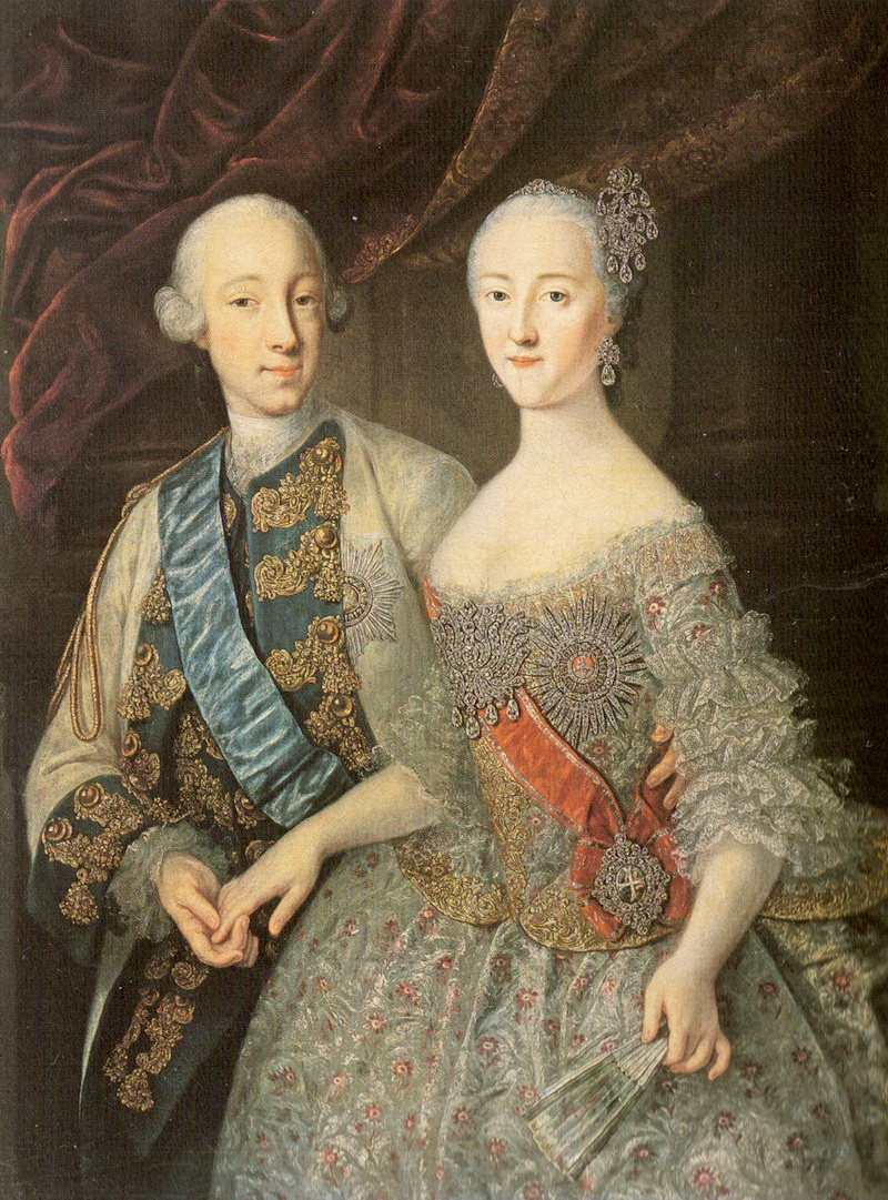 Портрет великого князя Петра Федоровича и великой княгини Екатерины Алексеевны Portrait of the Grand Duke Peter Fyodorovich and the Grand Duchess Catherine Alexeyevna 1745 (?) Авторство Гроота под вопросом Холст, масло. 129 х 100 На обороте черным: 6695; штамп: Г.Р.М. инв. № 3481 (номер зачеркнут) Пост.: 1927 из ГЭ*; ранее - Романовская галерея Зимнего дворца Ж-5341 Петр Федорович изображен в офицерском мундире лейб-драгунского полка Голштинских войск с орденом святого Андрея Первозванного (лента и звезда). Екатерина Алексеевна - с орденом святой Екатерины Большого креста (лента, крест и звезда). В Каталоге 1980 - Гроот Г.-К. Датирован 1740-ми. Впервые портрет был воспроизведен в 1866 в "Galerie de la Maison des Romanoff" (St. Petersburg. - 1974 - no 34), но без указания автора. В 1894 в Энциклопедическом словаре Брокгауза и Ефрона (СПб. - 1894. - Т. 18. - С. 773) в статье о художнике, подписанной инициалами А. С., портрет приписывается Г.-К. Грооту. На Таврической выставке экспонировался как работа Г.-К. Гроота (Петербург 1905; Кат. Таврической выст., № 334, 335**). А.В. Селиванов считает, что „технико-технологические признаки противоречат авторству Г.-К. Гроота" (Селиванов 1986***). Авторство Г.-К. Гроота ставит под сомнение и Л.А. Маркина (Маркина 1983****, с. 125). Стилистические признаки, а также отсутствие архивных документов о создании двойного портрета заставляют усомниться в авторстве художника. В августе 1745 состоялось бракосочетание Петра Федоровича и Екатерины Алексеевны. Вполне вероятно, что парный портрет был написан именно в этом году как портрет жениха и невесты.